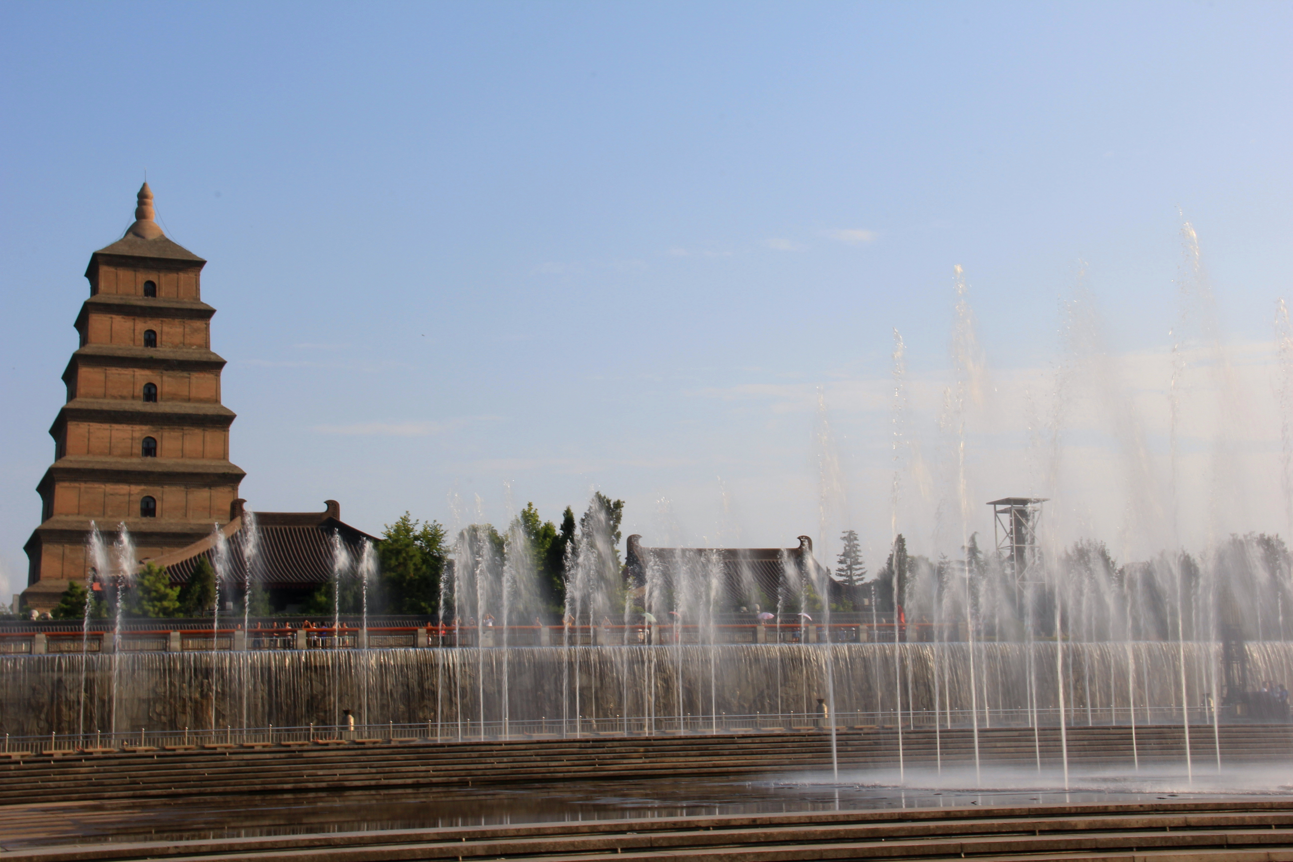 中文（中国大陆）: 大雁塔广场，喷泉表演进行中